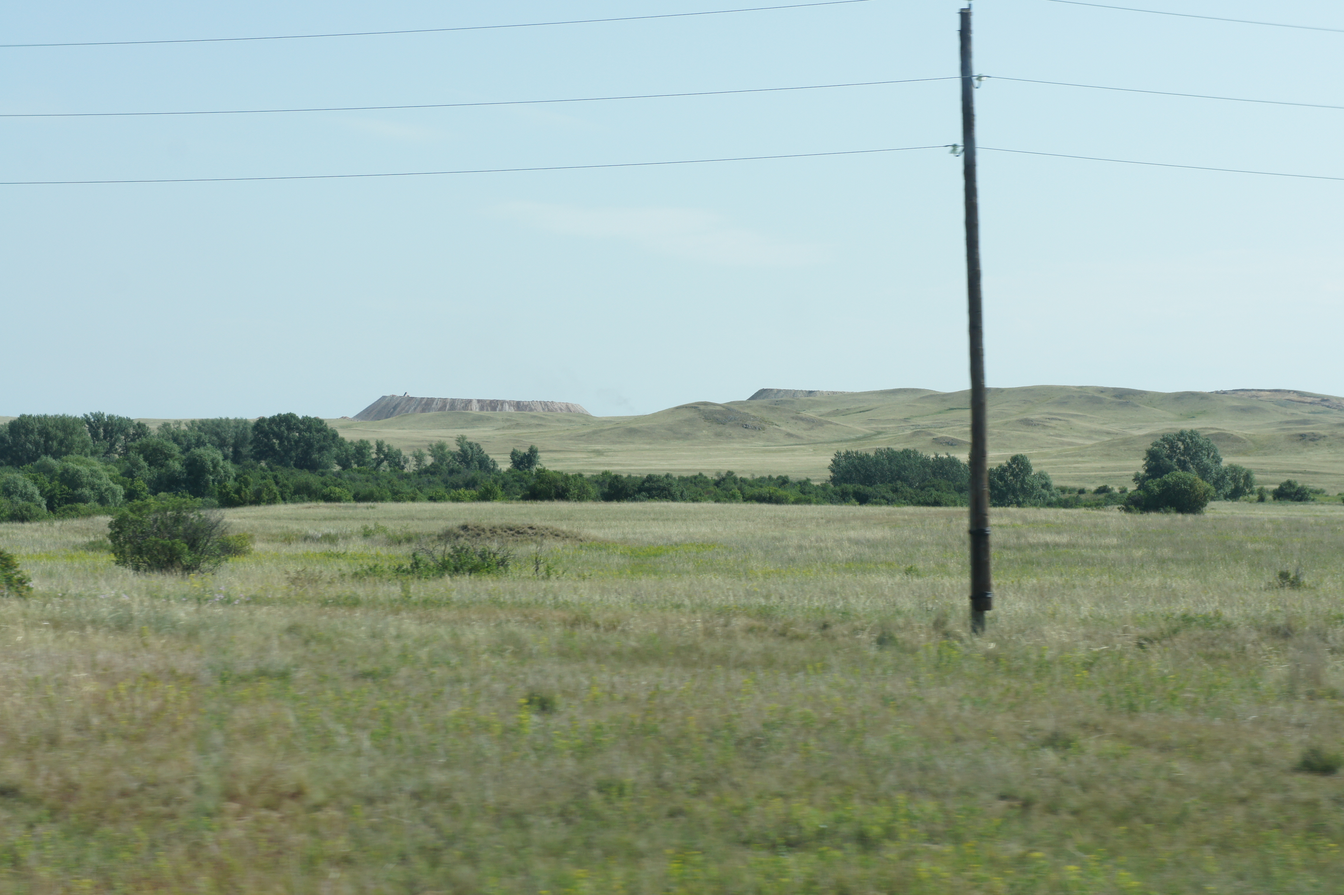 добыча золота в с. Новофирсово Курьинского района